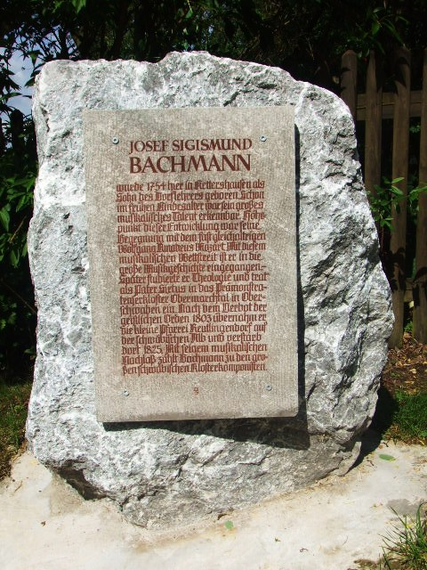 Kettershausen, Landkreis Unterallgäu Gedenkstein für den Komponisten Sixt Bachmann "Josef Sigismund Bachmann wurde 1754 hier in Kettershausen als Sohn des Dorflehrers geboren. Schon im frühen Kindesalter war sein großes musikalisches Talent erkennbar. Höhepunkt dieser ntwicklung war seine Begegnung mit dem fast gleichaltrigen Wolfgang Amadeus Mozart. Mit diesem musikalischen Wettstreit ist er in die große Musikgeschichte eingegnagen. Später studierte er Theologie und trat als Pater Sixtus in das Prämonstratenserkloster Obermarchtal in Oberschwaben ein. Nach dem Verbot der geistlichen Orden 1893 übernahm er die kleine Pfarrei Reutlingendorf auf der schwäbischen Alb und verstarb dort 1825. Mit seinem musikalischen Nachlaß zählt Bachmann zu den großen schwäbischen Klosterkomponisten."